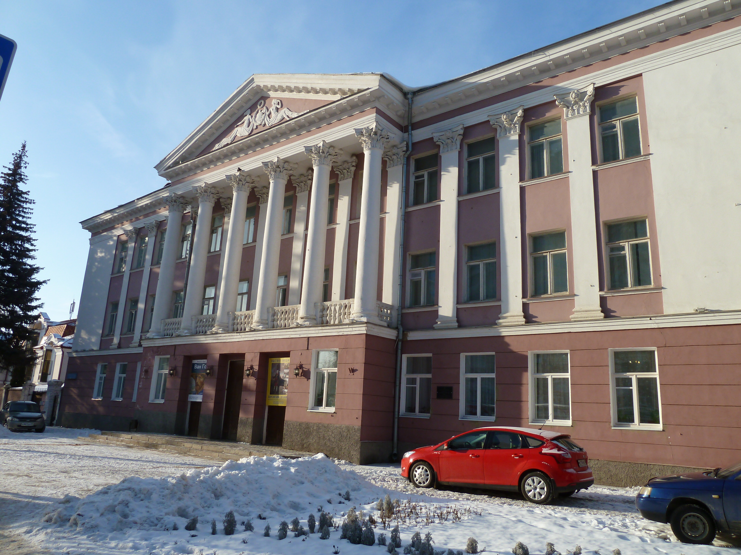 Музей изобразительных искусств (в бывшем Доме политпросвещения)